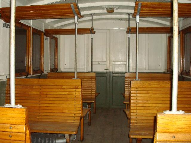 Innenansicht des 3. Klasse Abteils des Régional des Brenets (RdB) BC2 11 aus dem Jahre 1890 im Jahre 2008 bei der Museumsbahn Blonay-Chamby.